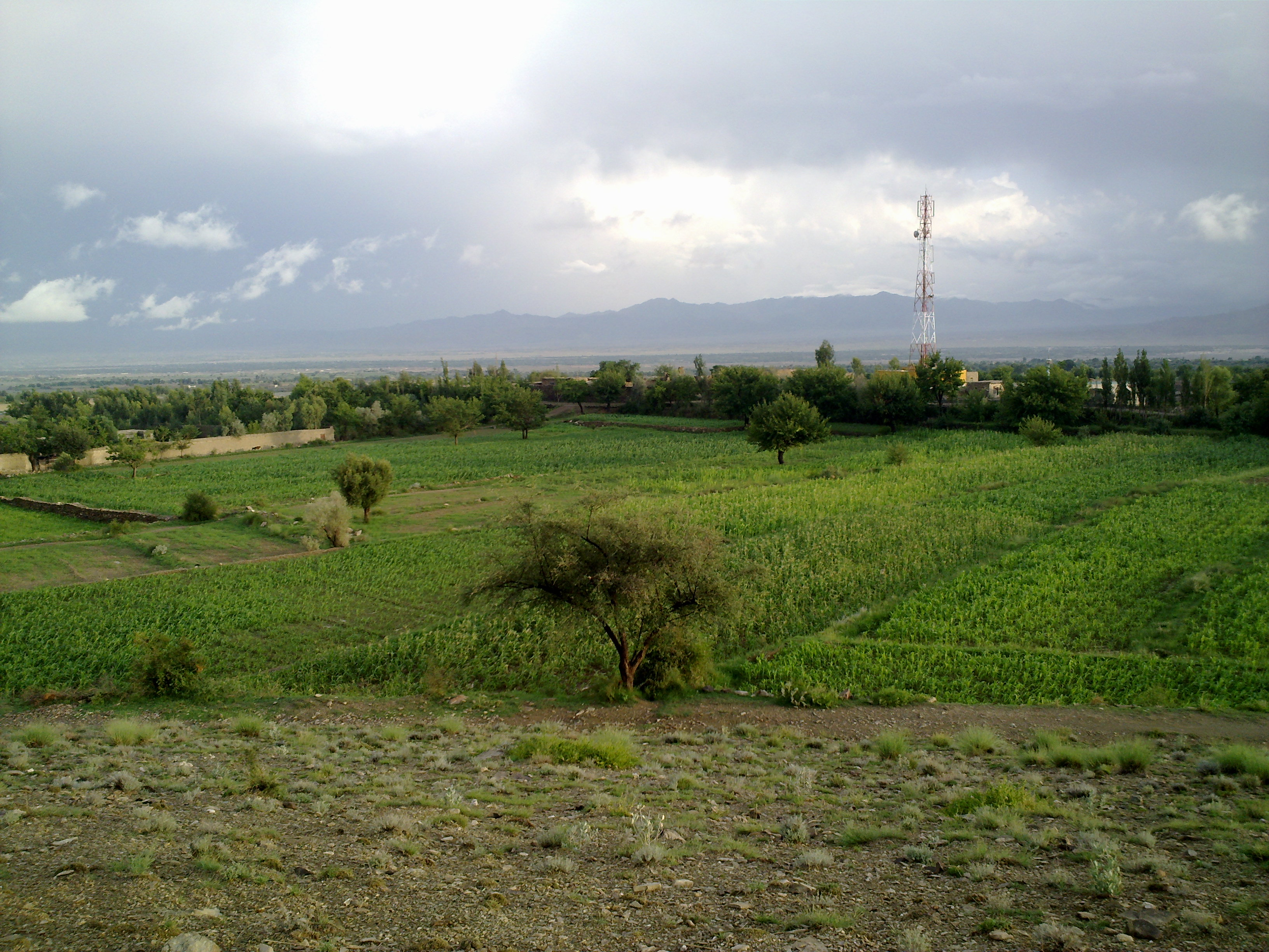 Sowy Nabi